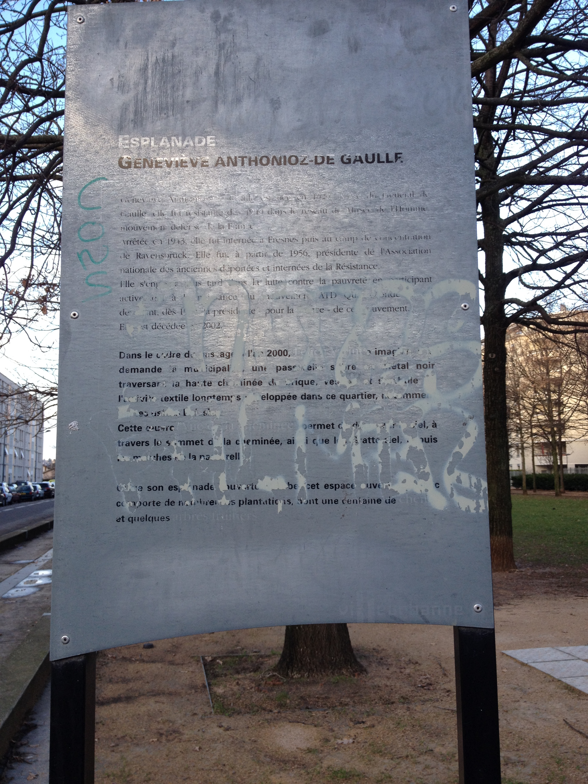 Esplanade Geneviève-Anthonioz de Gaulle à Villeurbanne.